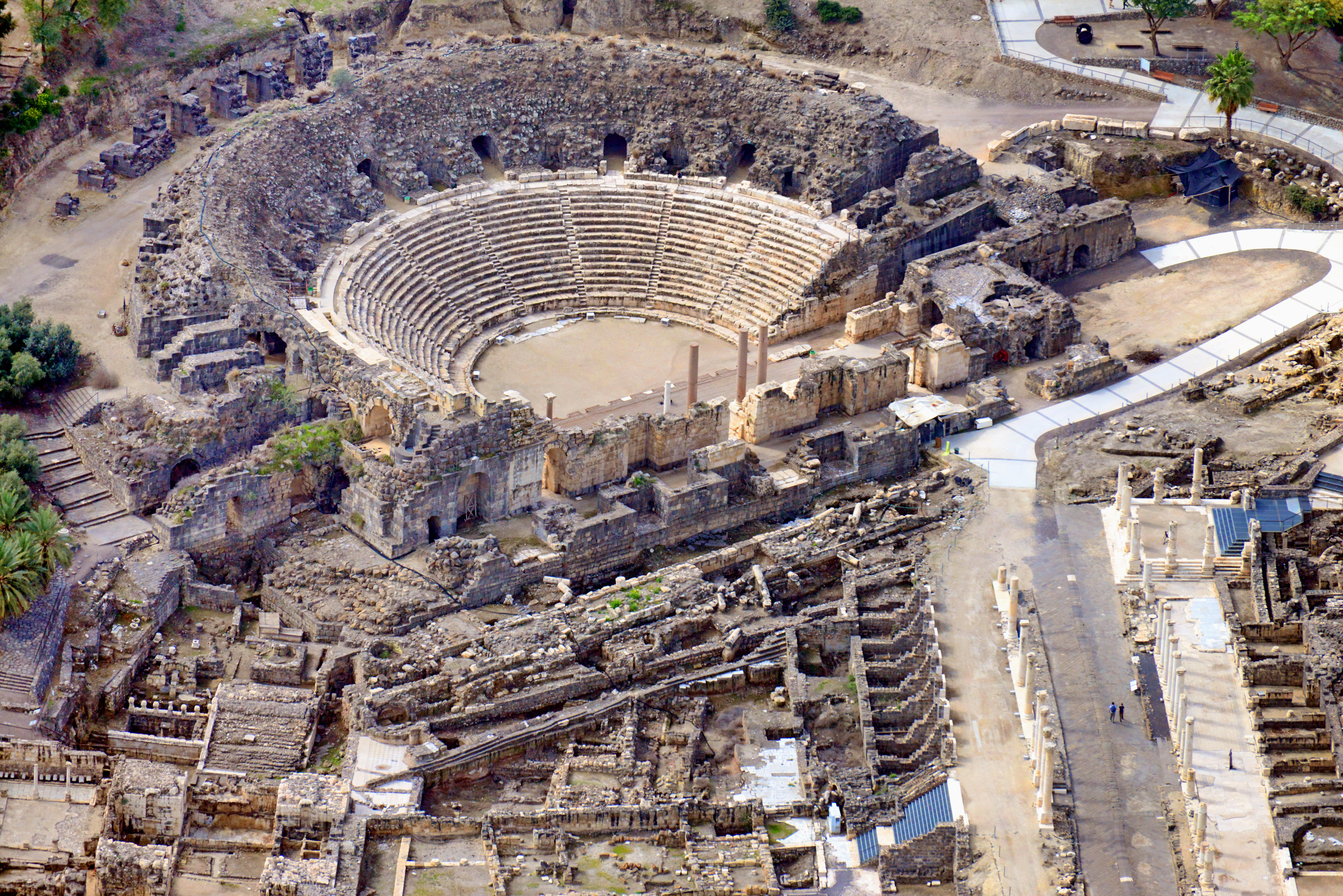 בית שאן מוזכרת במקורות והיא מיושבת ברציפות מאז התקופה הכלקוליתית (4000 לפנה"ס). היא ממוקמת על צירים של כמה דרכים אסטרטגיות:ירושלים-טבריה; בקעת הירדן-הים התיכון; דרך הים שחיברה בין מצריים למסופוטמיה, נמצאת על נקודת המפגש בין בקעת הירדן לעמק יזרעאל.